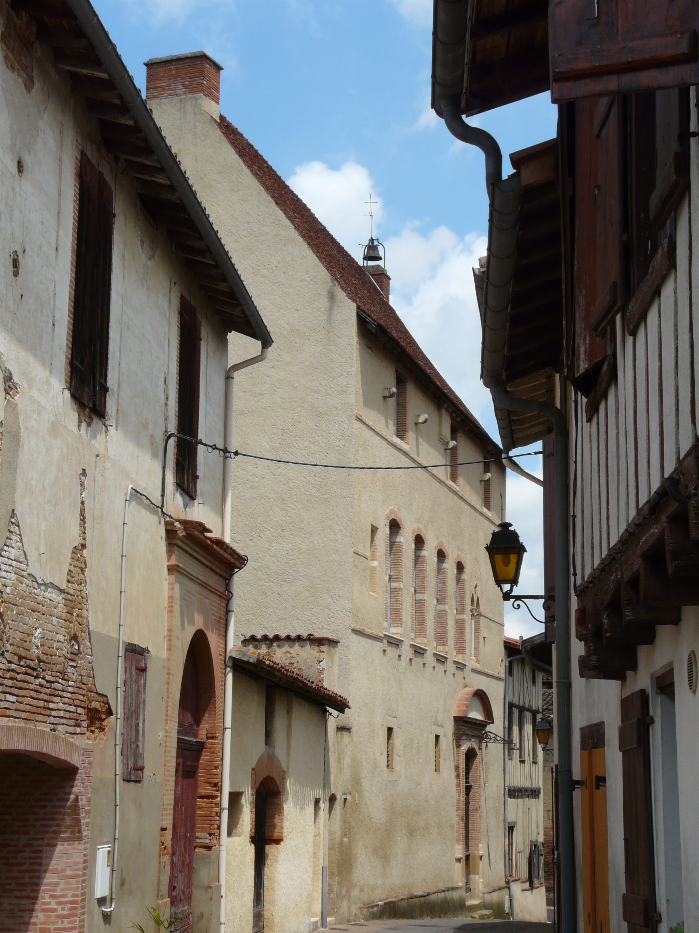 La Tourasse dans la rue de Salles à Rieux-Volvestre (Haute-Garonne, France).